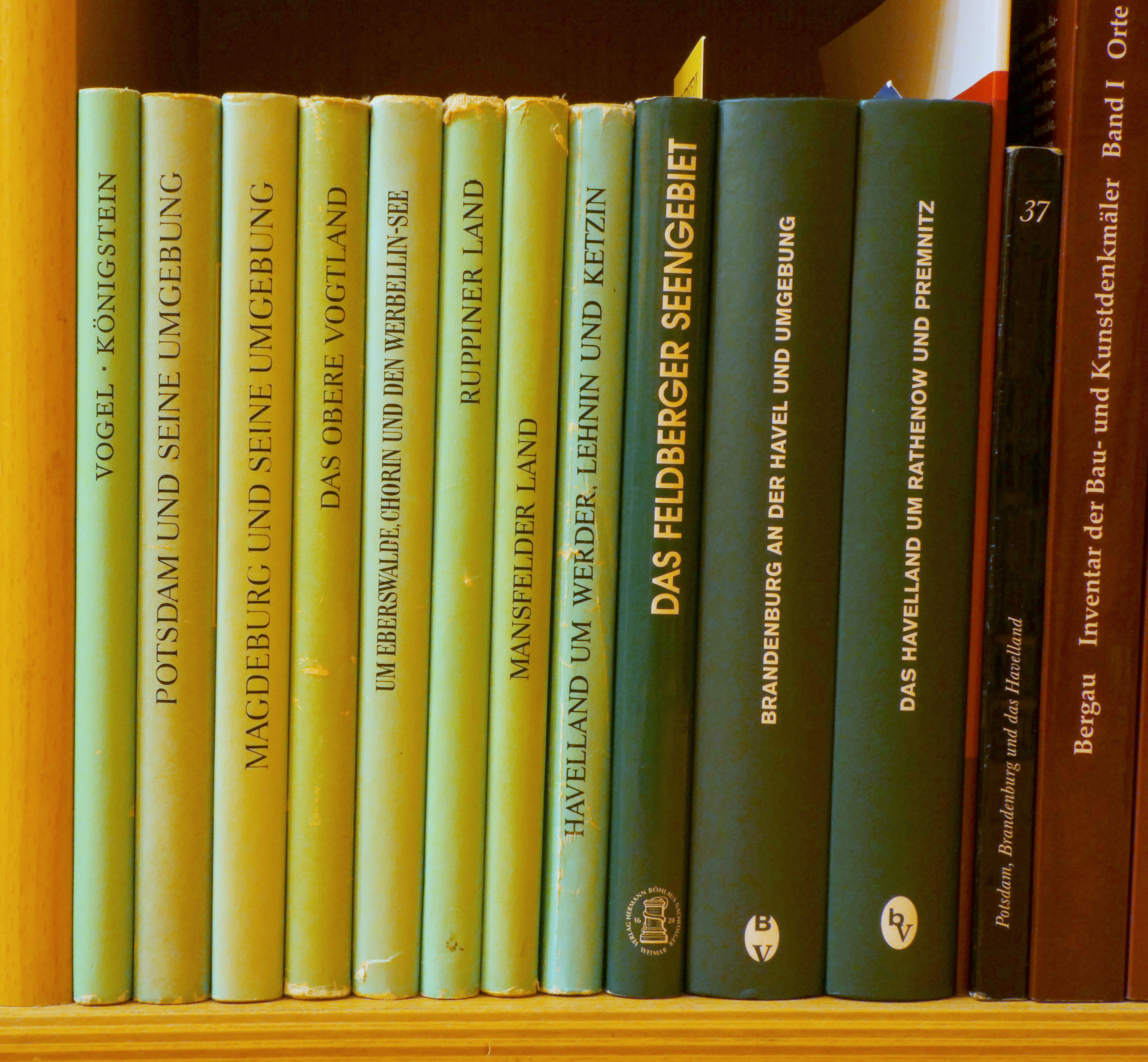 Werte der deutschen Heimat, Buchrücken